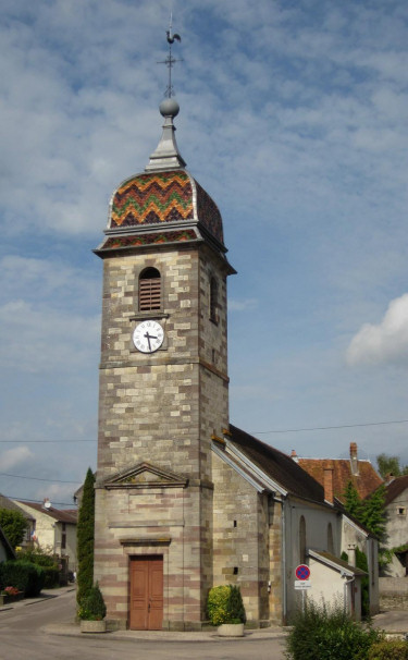 Eglise et clocher de Mersuay en 2013